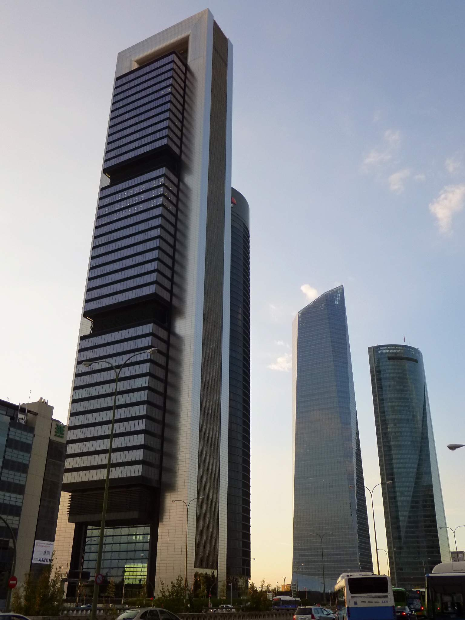 Cuatro Torres Business Area (CTBA), Madrid